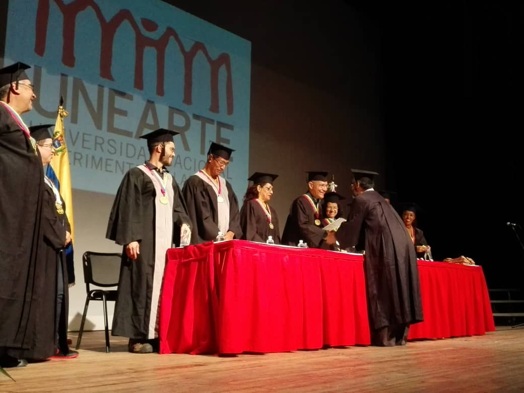 Conferimiento de titulos